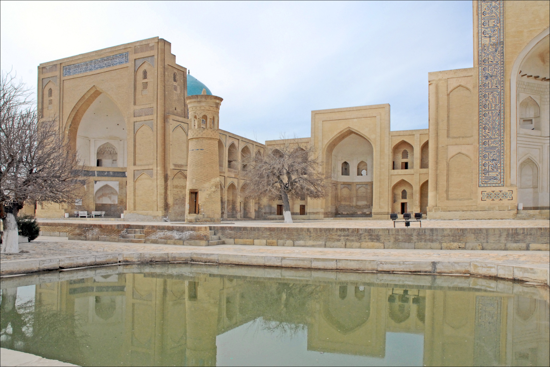 La nécropole de Tchor Bakhr s'est développée, dans le village de Soumitan, à 7 km de Boukhara, autour des tombes des quatre frères Bakhr. En 970, l'imam Sayid Abou Bakhr et ses trois frères, tous descendants du Prophète, ont été inhumés en cet endroit. Une communauté de derviches soufis : la secte Khodjoroum, s'est la première installée autour des tombes. Puis en 1559, Abdoullah Khan y fit construire une khanagha, une mosquée et une médersa. Au cours des siècles, de nombreux fidèles ont voulu être enterrés dans ce lieu saint, aboutissant à une très importante nécropole. L'ensemble architectural a été rénové en 2001.